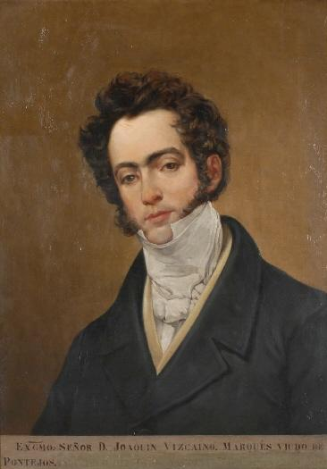 Joaquín Vizcaíno, marqués consorte y viudo de Casa Pontejos (1790-1840). Óleo sobre lienzo. 71 x 51 cm. Colección Municipal Dispersa (Galería de retratos de Alcaldes del Ayuntamiento de Madrid).